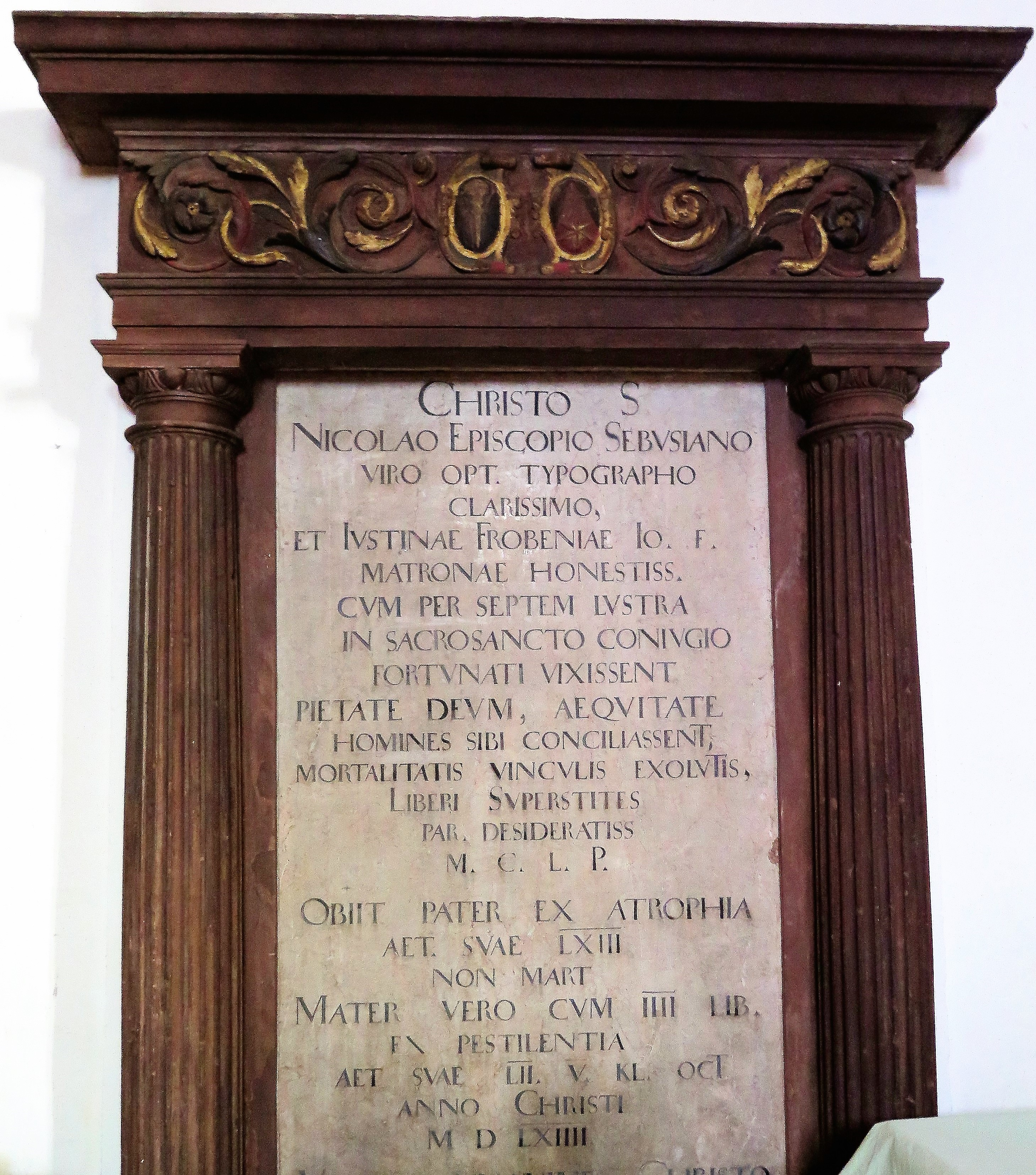 Epitaph des Nicolaus Episcopius, seiner Frau und vier Kindern in der Peterskirche Basel